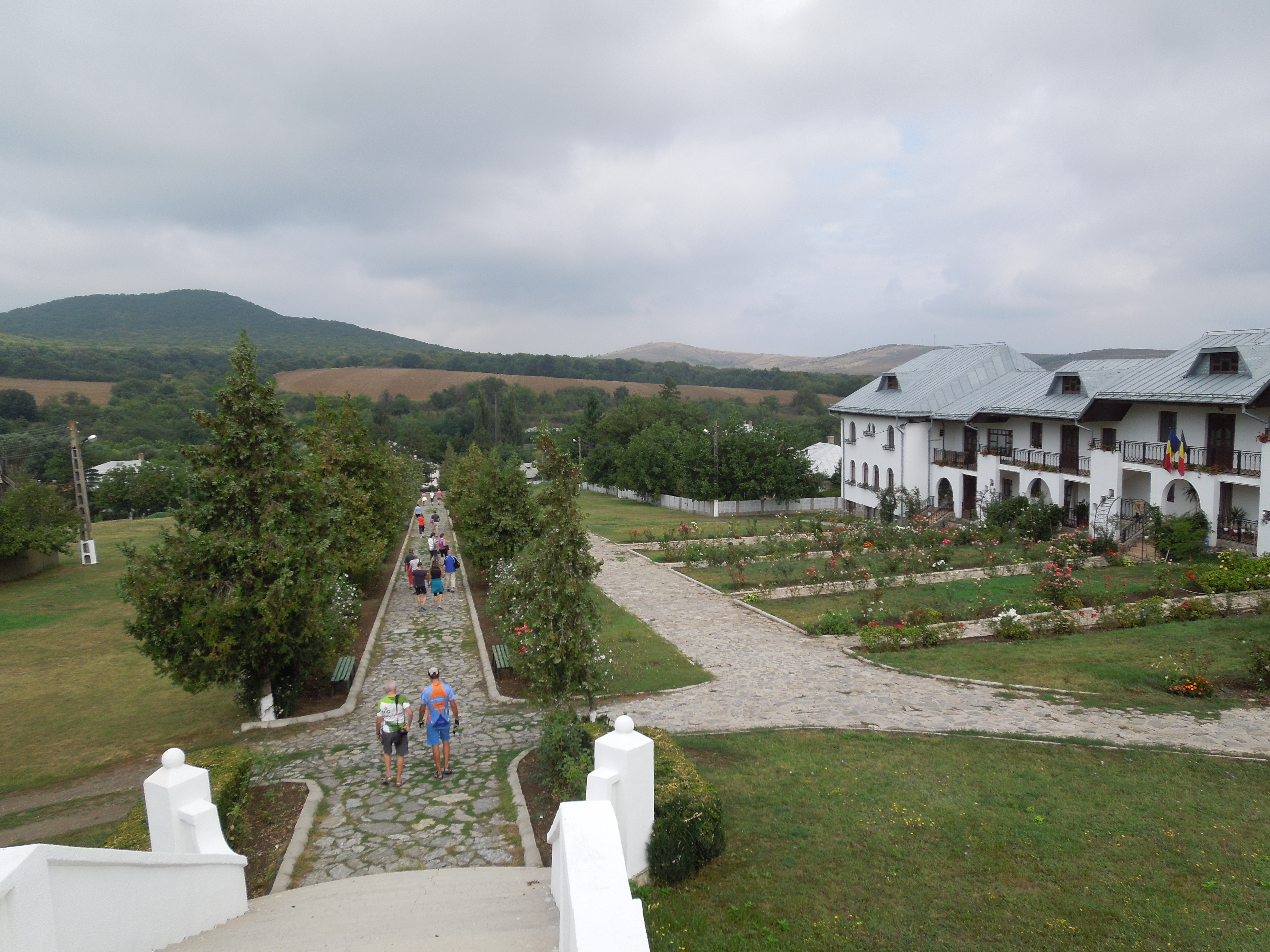 Mănăstirea Celic-Dere, Tulcea#Klöster